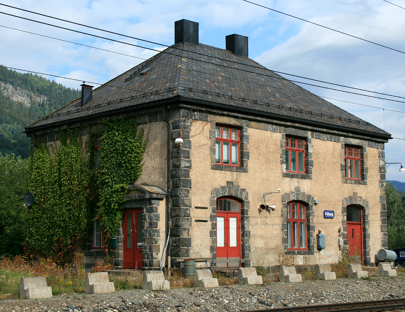 Fåberg stasjon, Dovrebanen. Bygd 1911. Arkitekt: Harald Kaas.